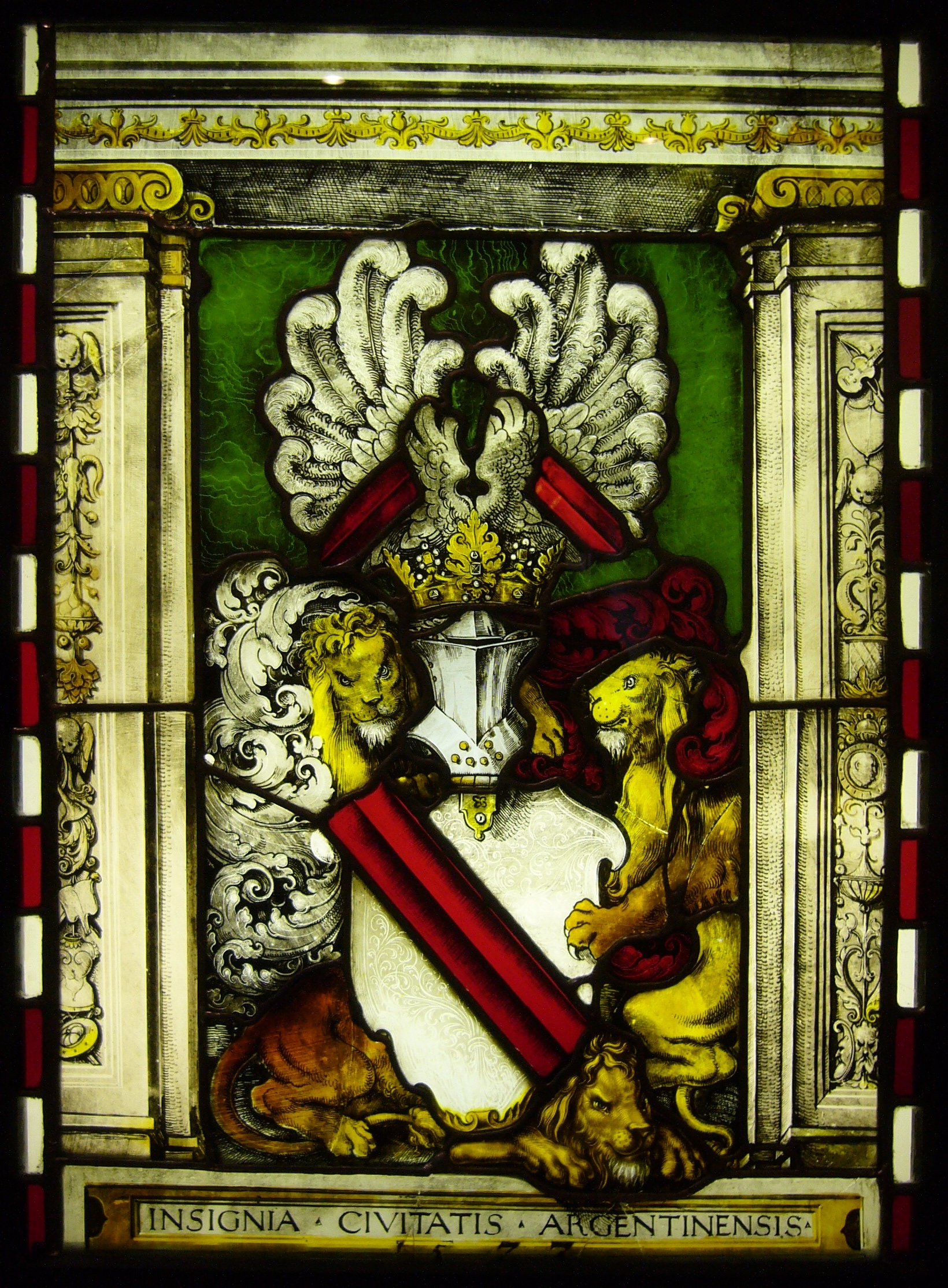 Vitrail présentant les armoiries de Strasbourg, XVIème siècle